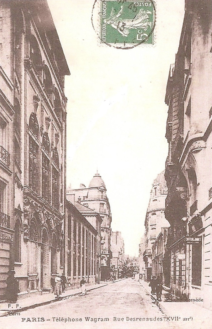 Bâti en 1897 par l'architecte Jean-Marie Boussard (1844-1923). Cet édifice, situé 29 rue des Renaudes (Paris-17e), est aujourd'hui détruit. Il abrita jusqu'à 400 demoiselles des téléphones.